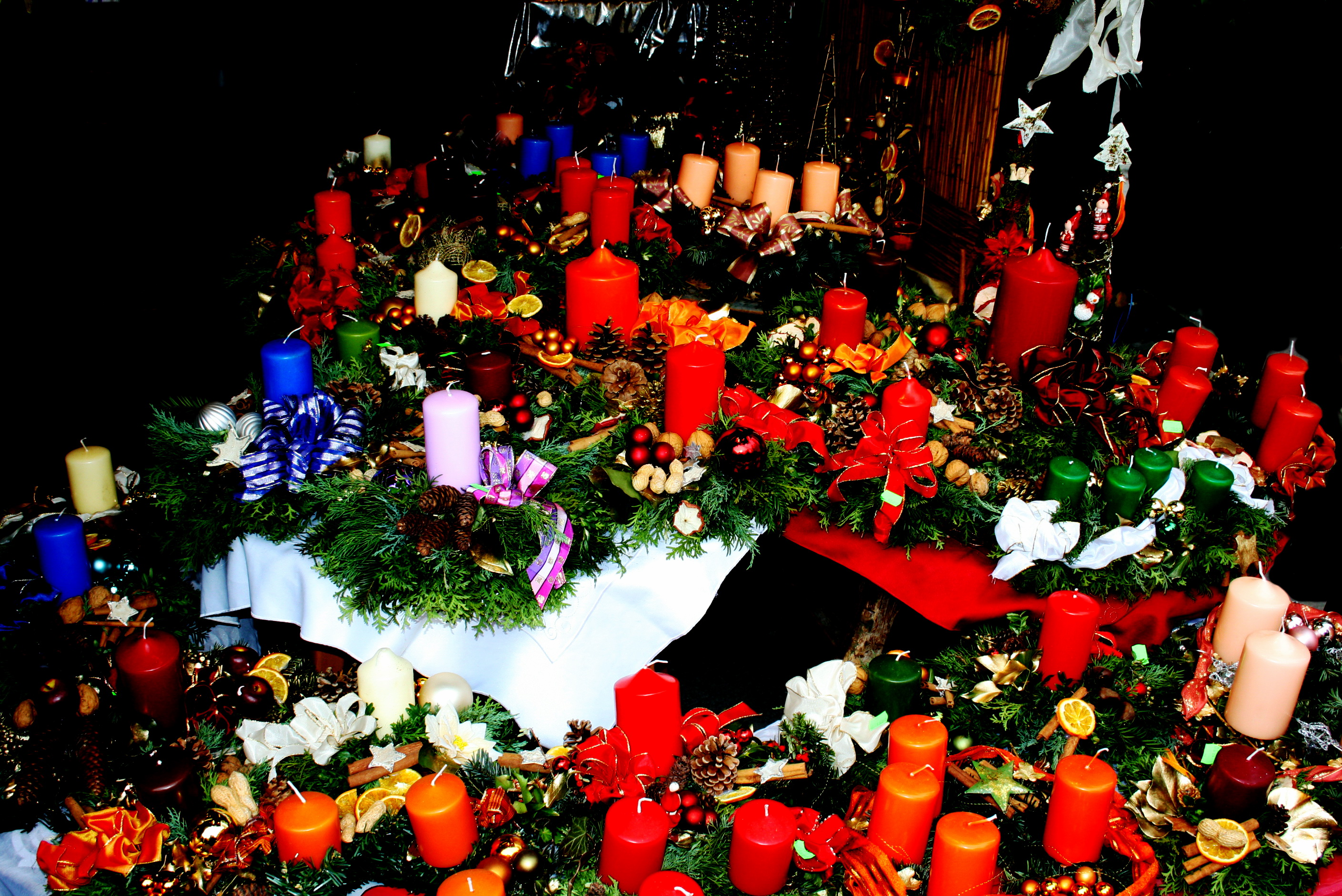 Marktstand am Salzburger Weihnachtsmarkt mit Adventskränzen.